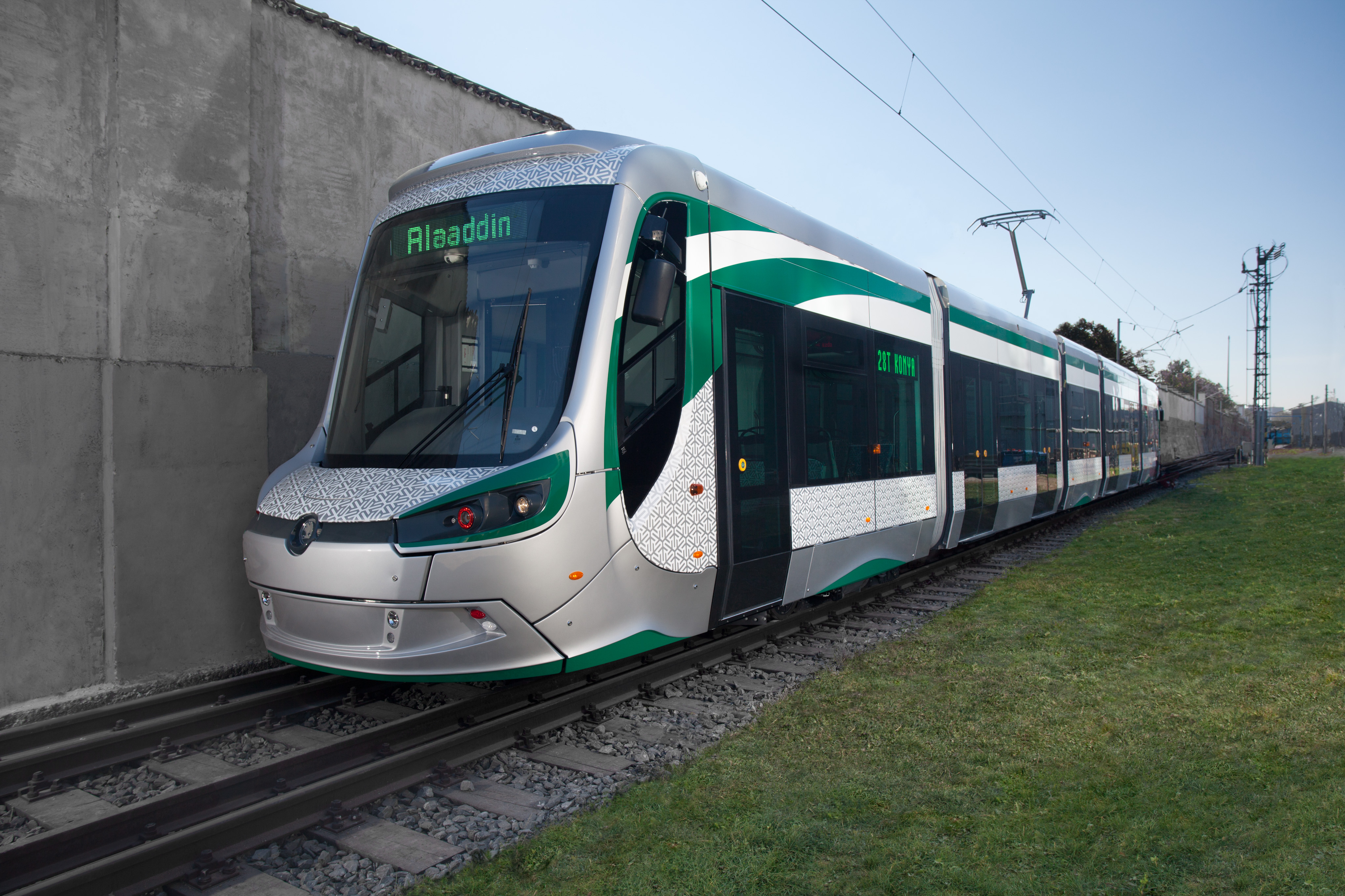 Tramvaj vyráběná pro turecké město Konya, v provozu od února roku 2014